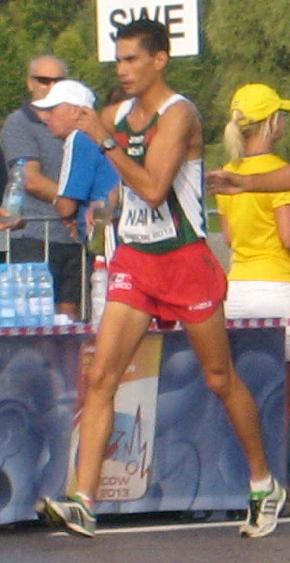 Чемпионат мира по лёгкой атлетике 2013. Ходьба 50 км, мужчины. Пелотон